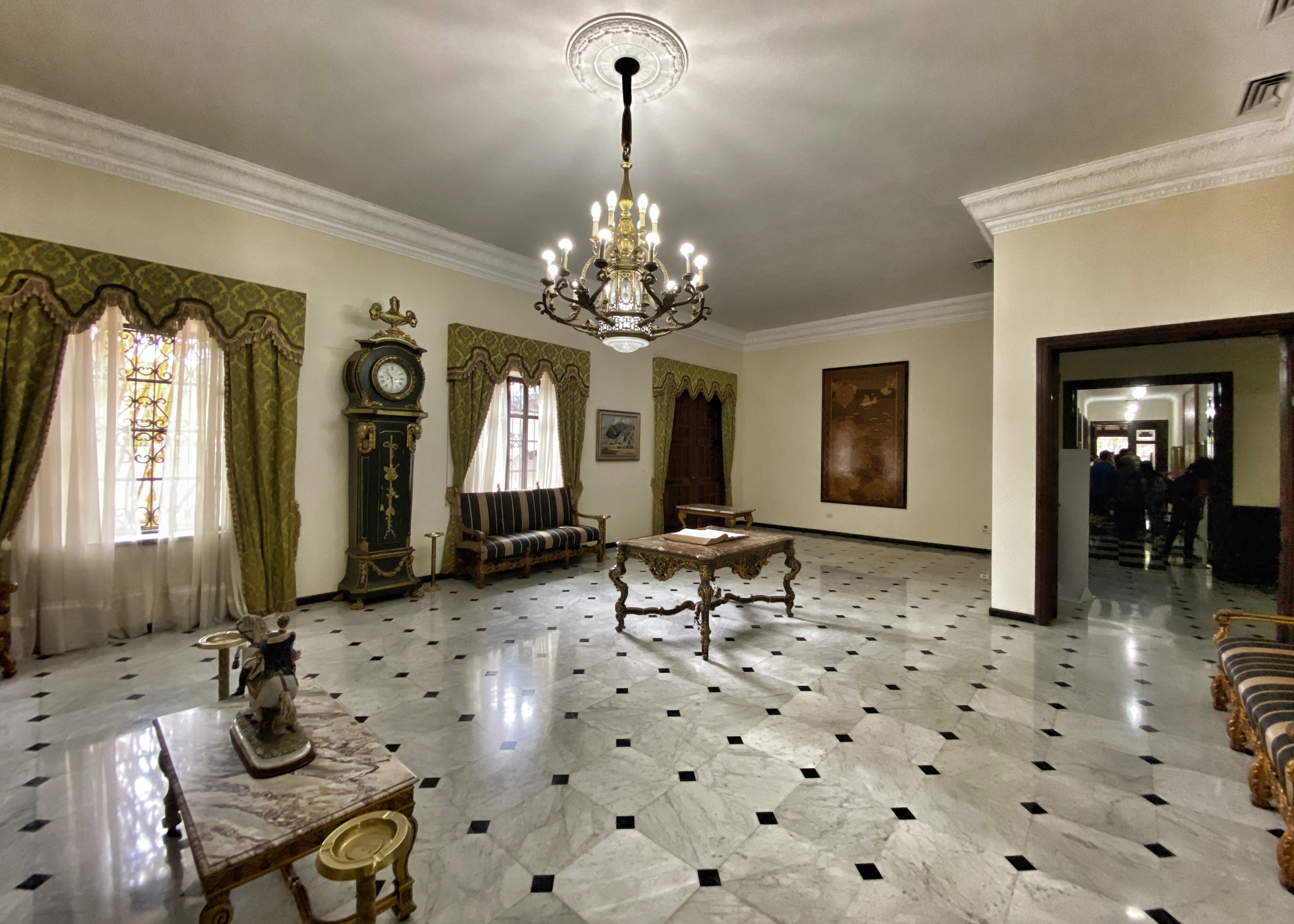 Detalle Residencia Presidencial La Casona, Caracas